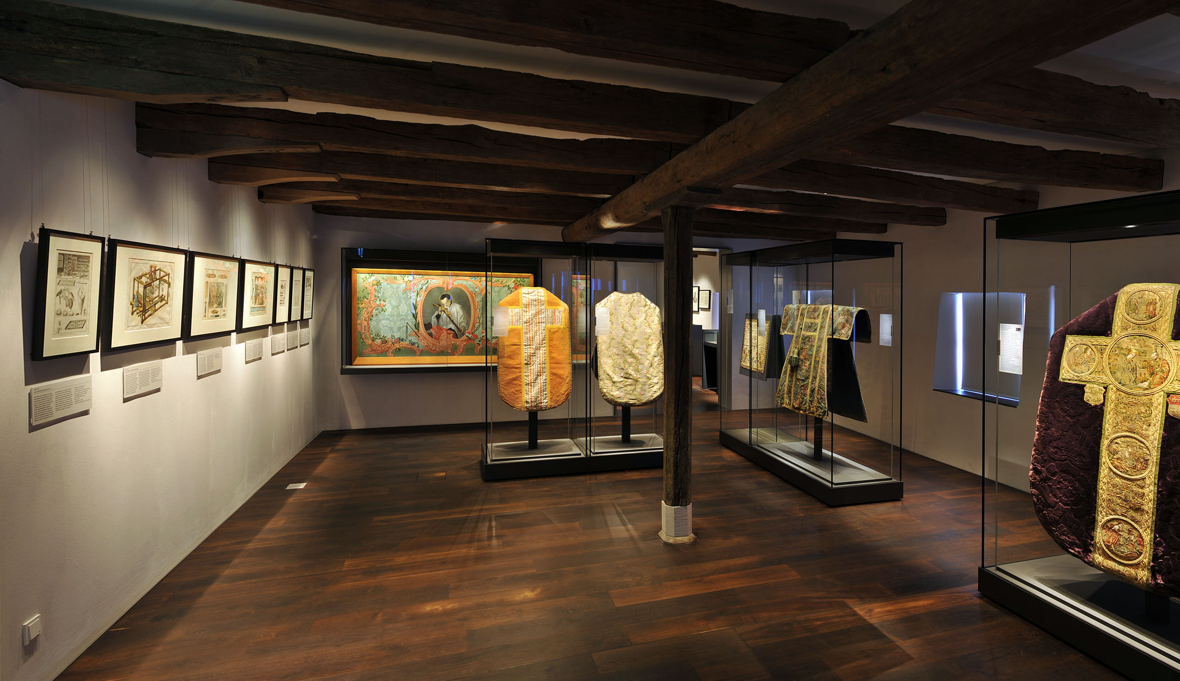 StiftsMuseum Xanten, Raum 8